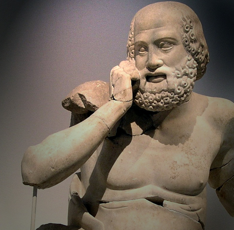 Figuren des Ostgiebels (2)